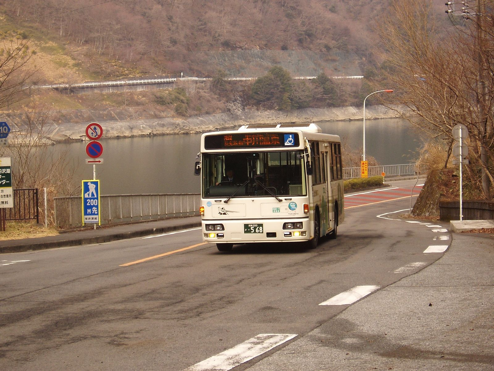 Fujikyu Shonan Bus M8368 Nissan Diesel KL-UA452M at Lake Tanzawa